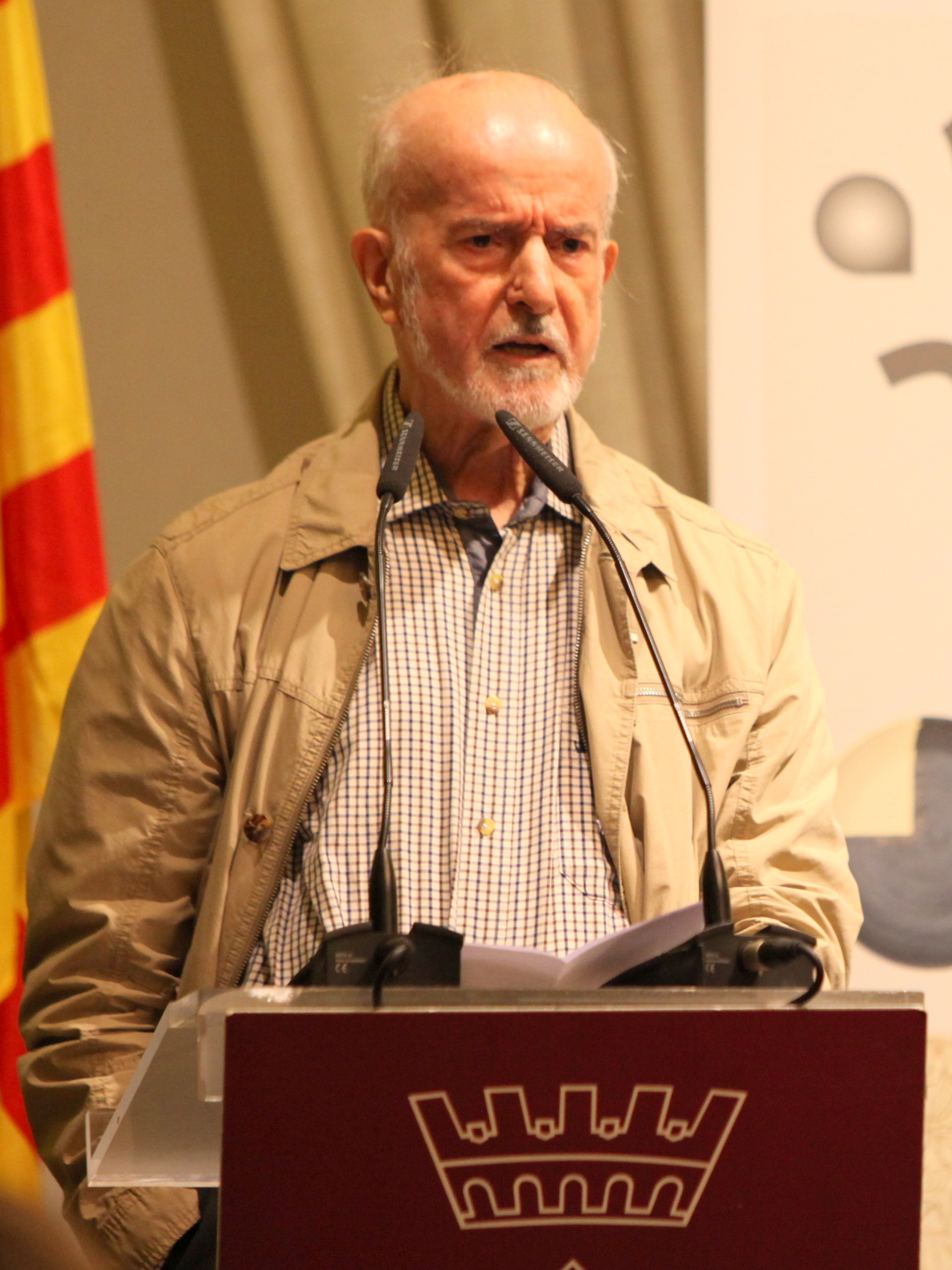 El Pare Botam guardonat a la IV edició del Memorial Àlex Seglers